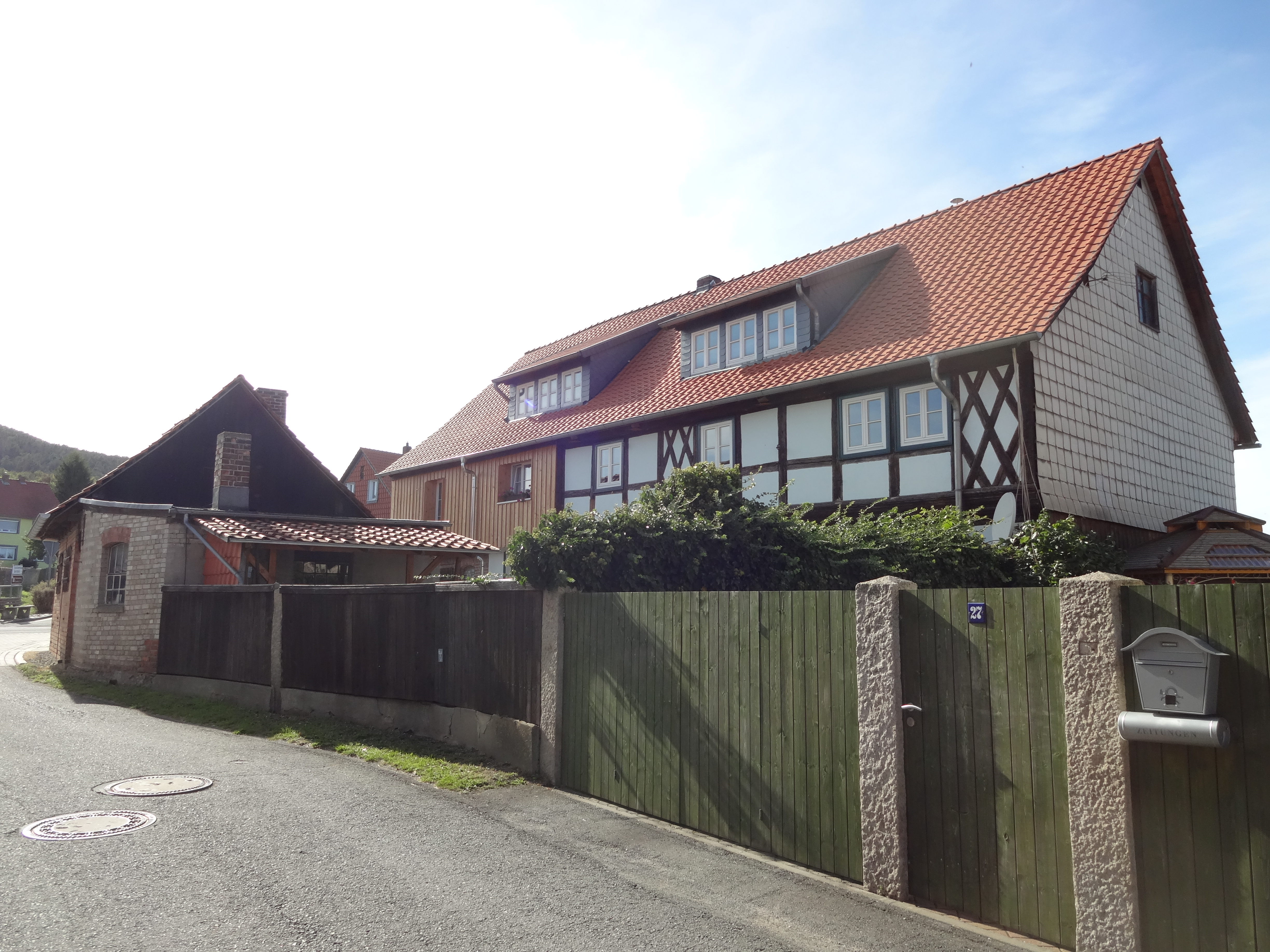 denkmalgeschütztes Wohnhaus in der Ilsenburger Straße 13 in Drübeck